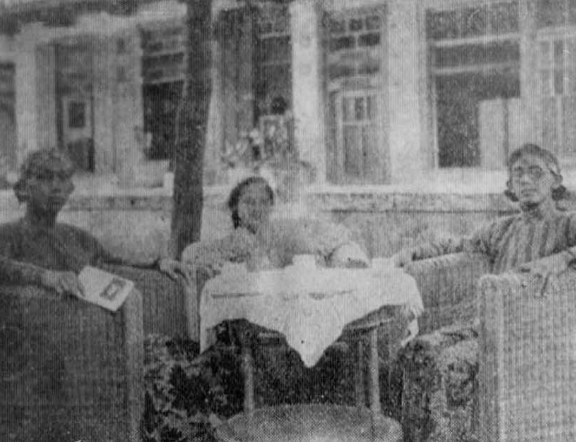 Dalam foto ini tampak A.R. Baswedan mengenakan blangkon dan surjan. Suatu pemandangan yang unik karena saat itu dia sebagai keturunan Arab sedang mengirimkan pesan bahwa meski keturunan Arab dia adalah seorang yang lahir dan besar di Indonesia.